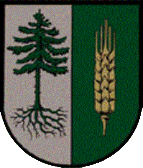 Das Wappen der Gemeinde Söchau soll auf die Entstehungsgeschichte hinweisen. Durch Rodung (Söchau = sekati = roden) (entwurzelte Fichte) entstand Kulturboden (Ähren).